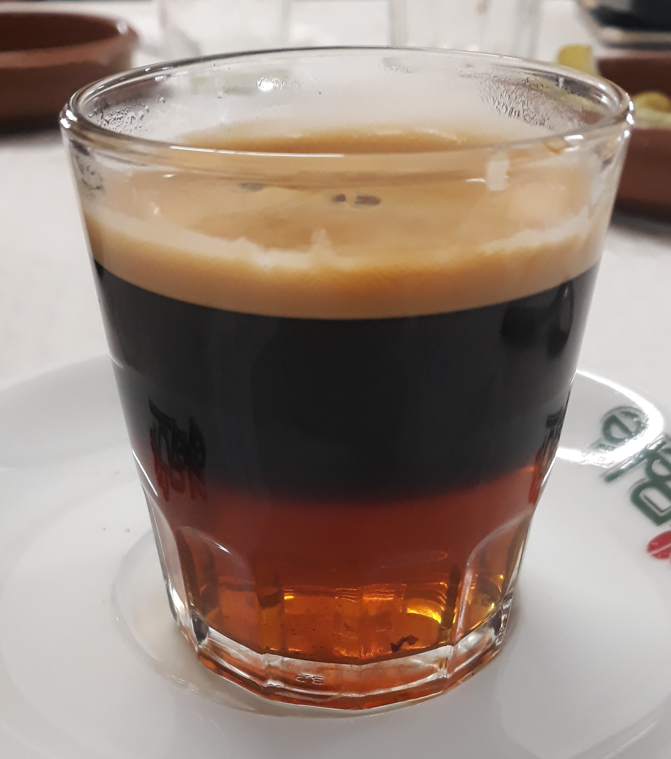 Emorzar a l'Ateneu d'Alaquàs